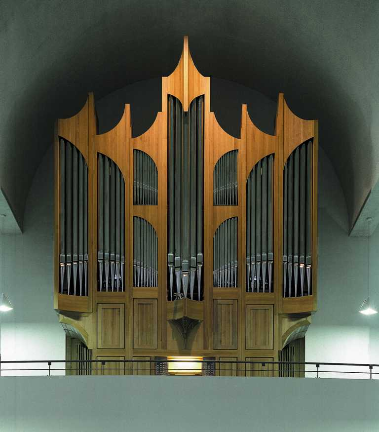 Ansicht der Vleugels-Orgel in der Probsteikirche in Jülich